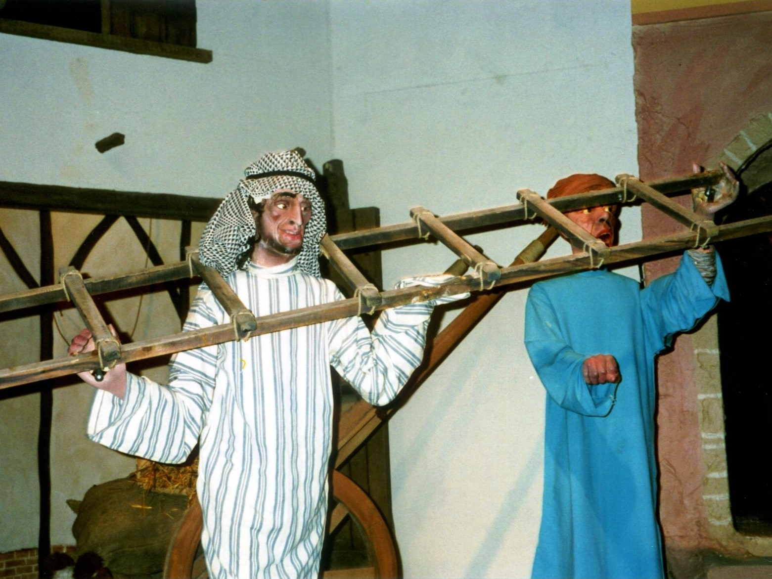 WalibiPalaisAlibaba